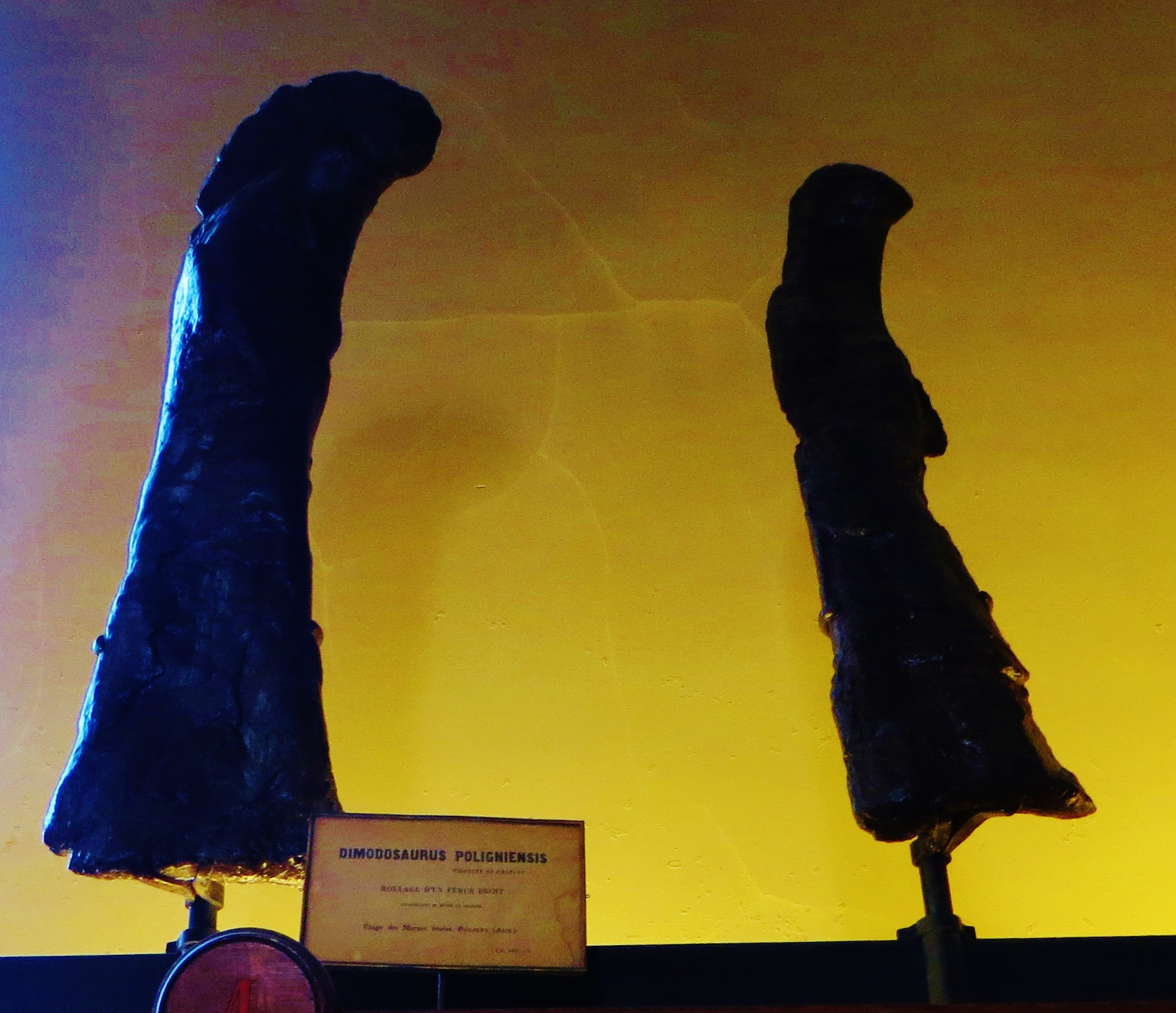 Fossil of Dimodosaurus, an extinct reptile- Took the photo at Musee d'Histoire Naturelle, Paris